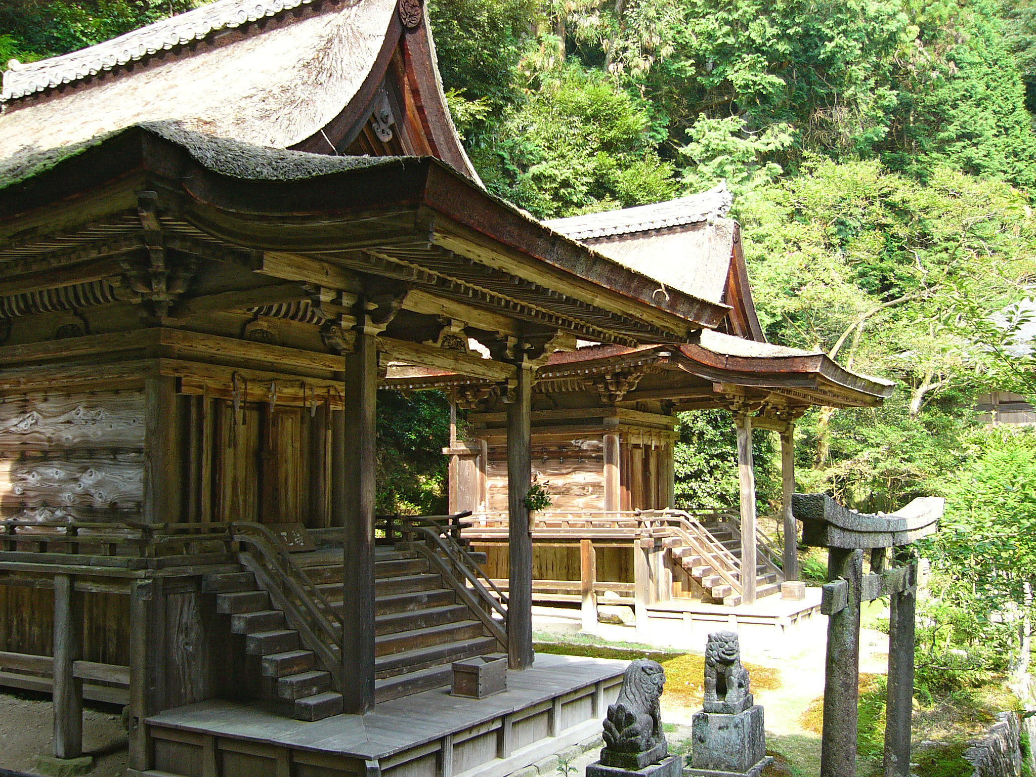 Engyoji in Himeji, Japan